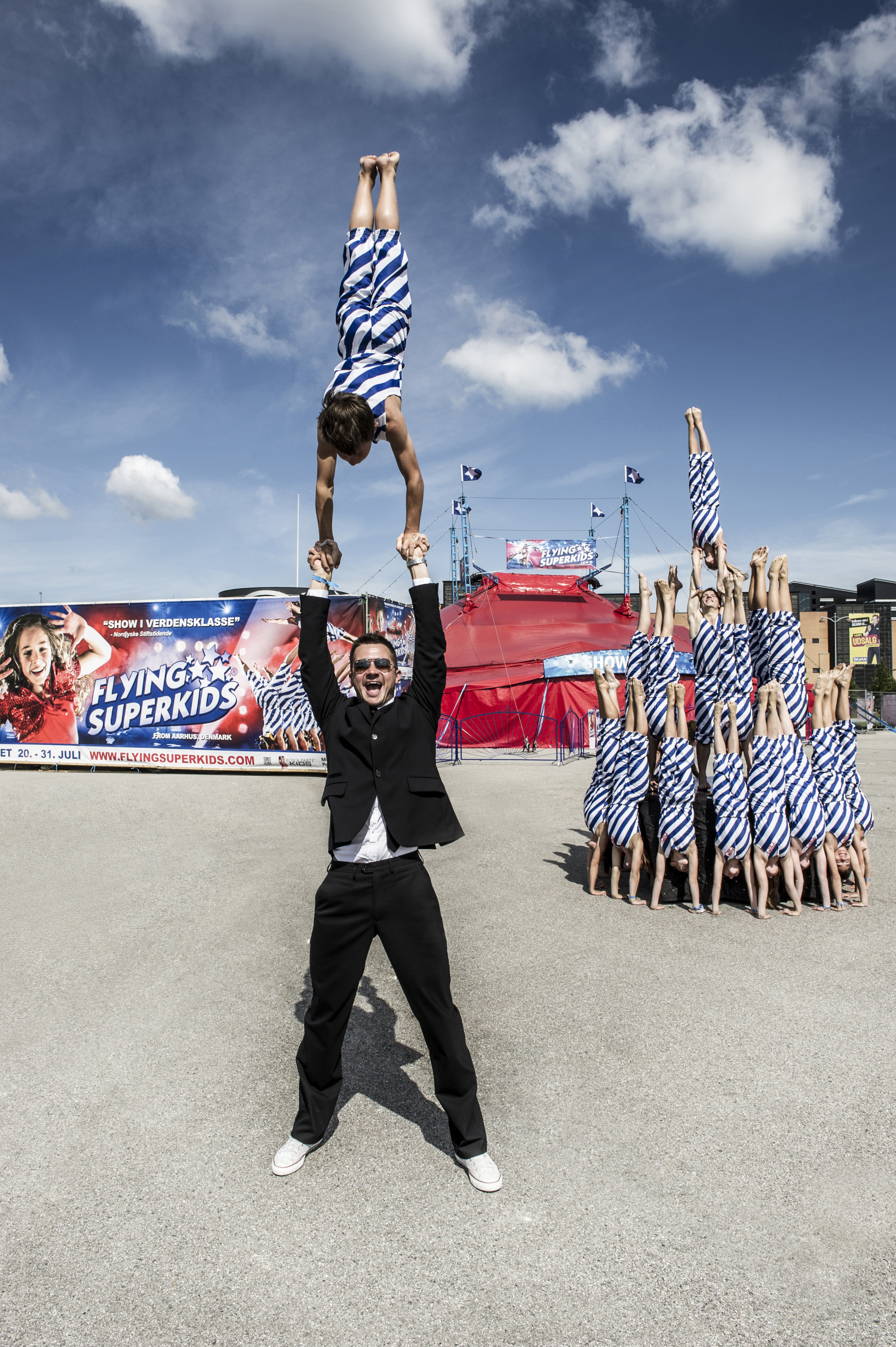 Lars Godbersen foran Flying Superkids gamle telt